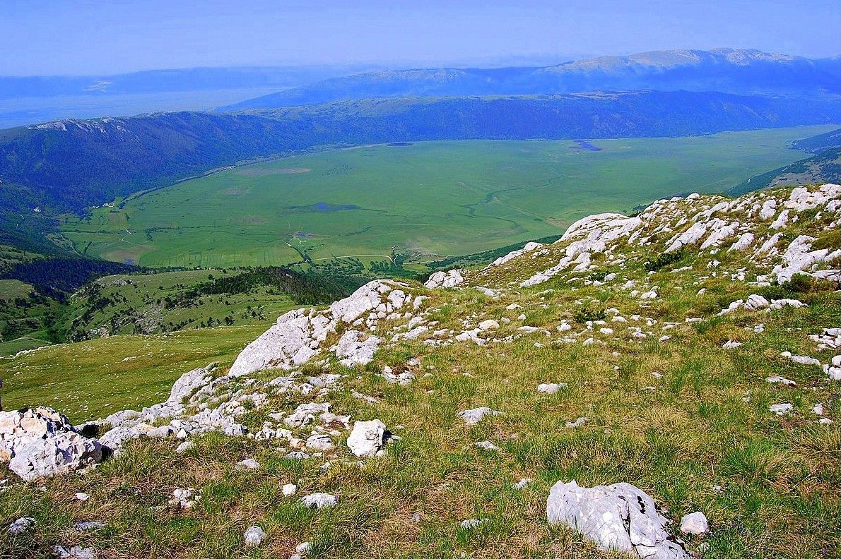 Glamočko polje, pogled sa Cincara